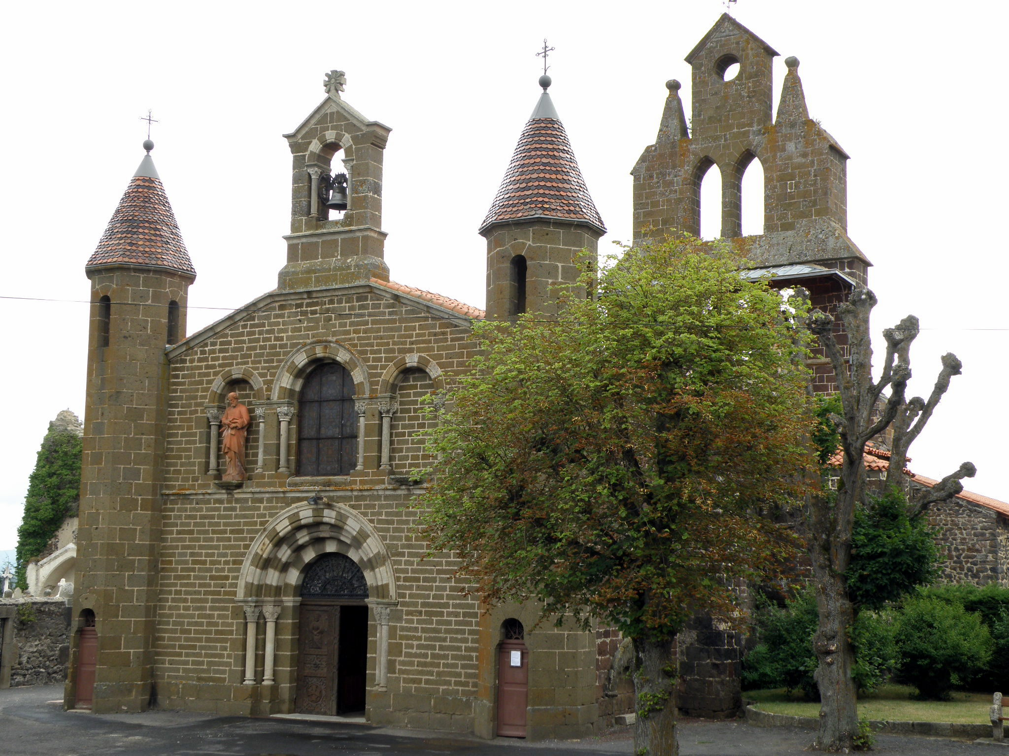 Solignac-sur-Loire, comm. de la Haute-Loire, France (région Auvergne). Église Saint-Vincent, façade occidentale.